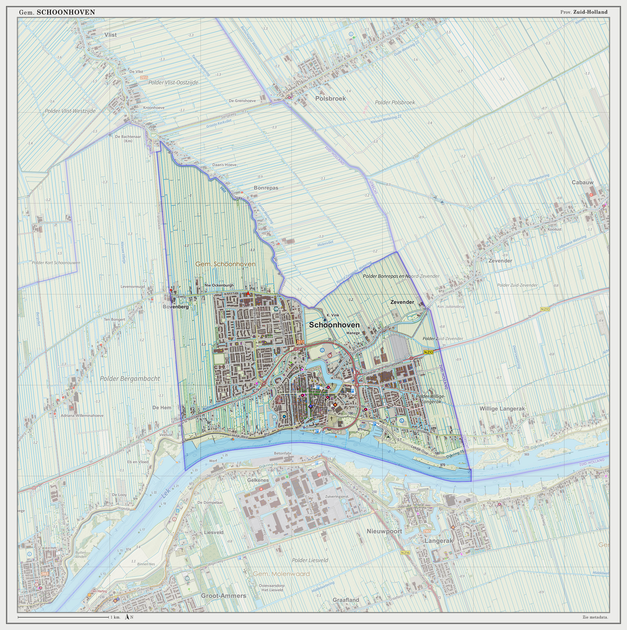 Topografische gemeentekaart per september 2014. Resolutie: 300 pixels/km. Kaartbeeld samengesteld uit de open geodata van de Top10NL en Top25namen (Kadaster, 30-sep-2014), Creative Commons-BY licentie. Gebouwvlakken uit open geodata BAG extract (8-sep-2014). Wegen uit de OpenStreetMap (15-sep-2014), OpenStreetMap community. Reliëfschaduw uit de Actuele Hoogtekaart AHN2 (8-mrt-2014). Samenstelling en kleurenschema: Jan-Willem van Aalst, met QGIS. Zie ook de Legenda.